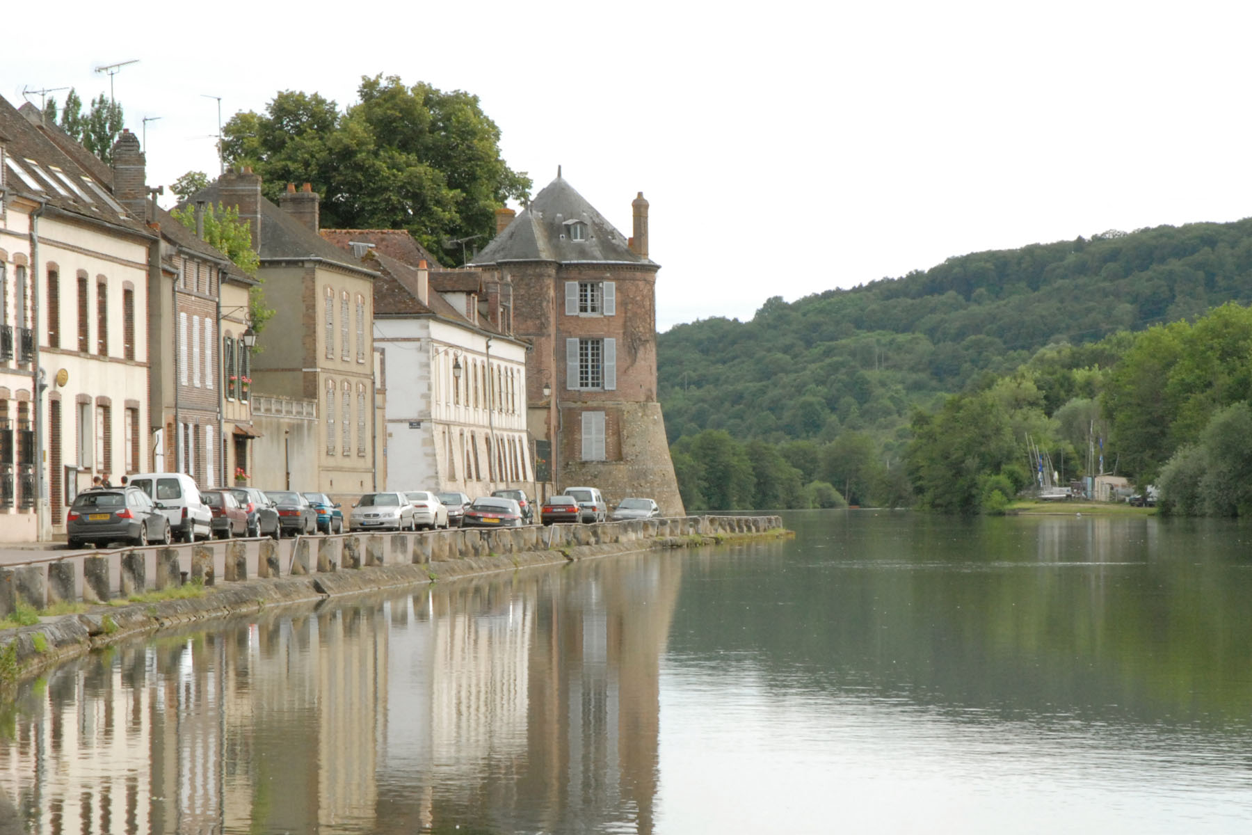 Villeneuve sur Yonne, jadis Villefranche le Roy, est aux confins de l’Ile de France, de la Champagne et de la Bourgogne